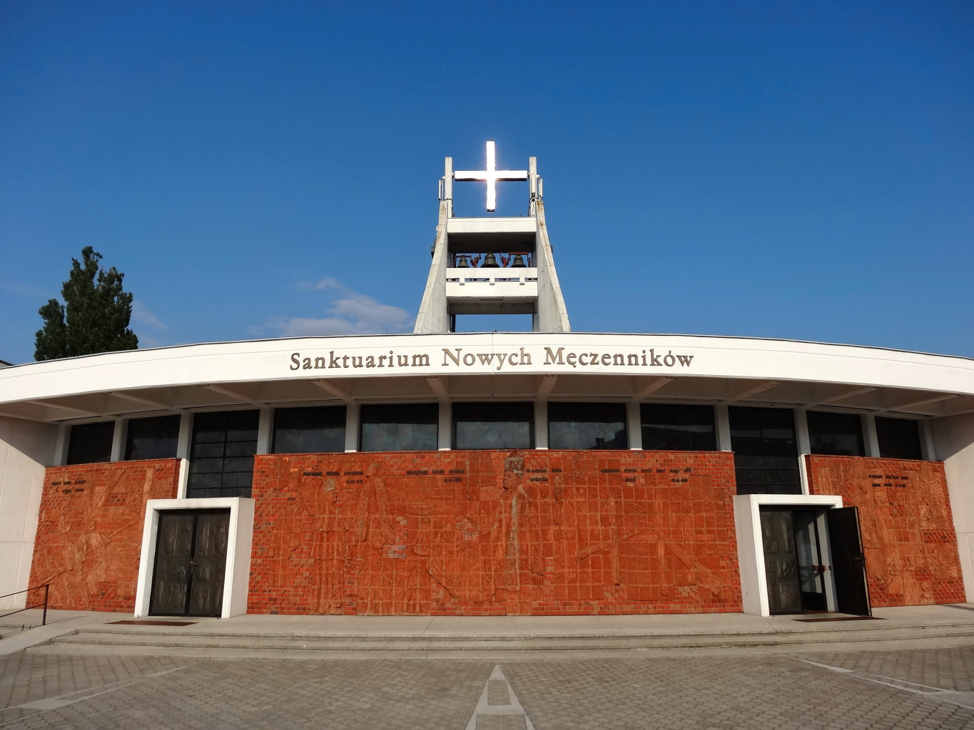 Kościół p.w. Świętych Polskich Braci Męczenników w Bydgoszczy na osiedlu Wyżyny, Sanktuarium Nowych Męczenników